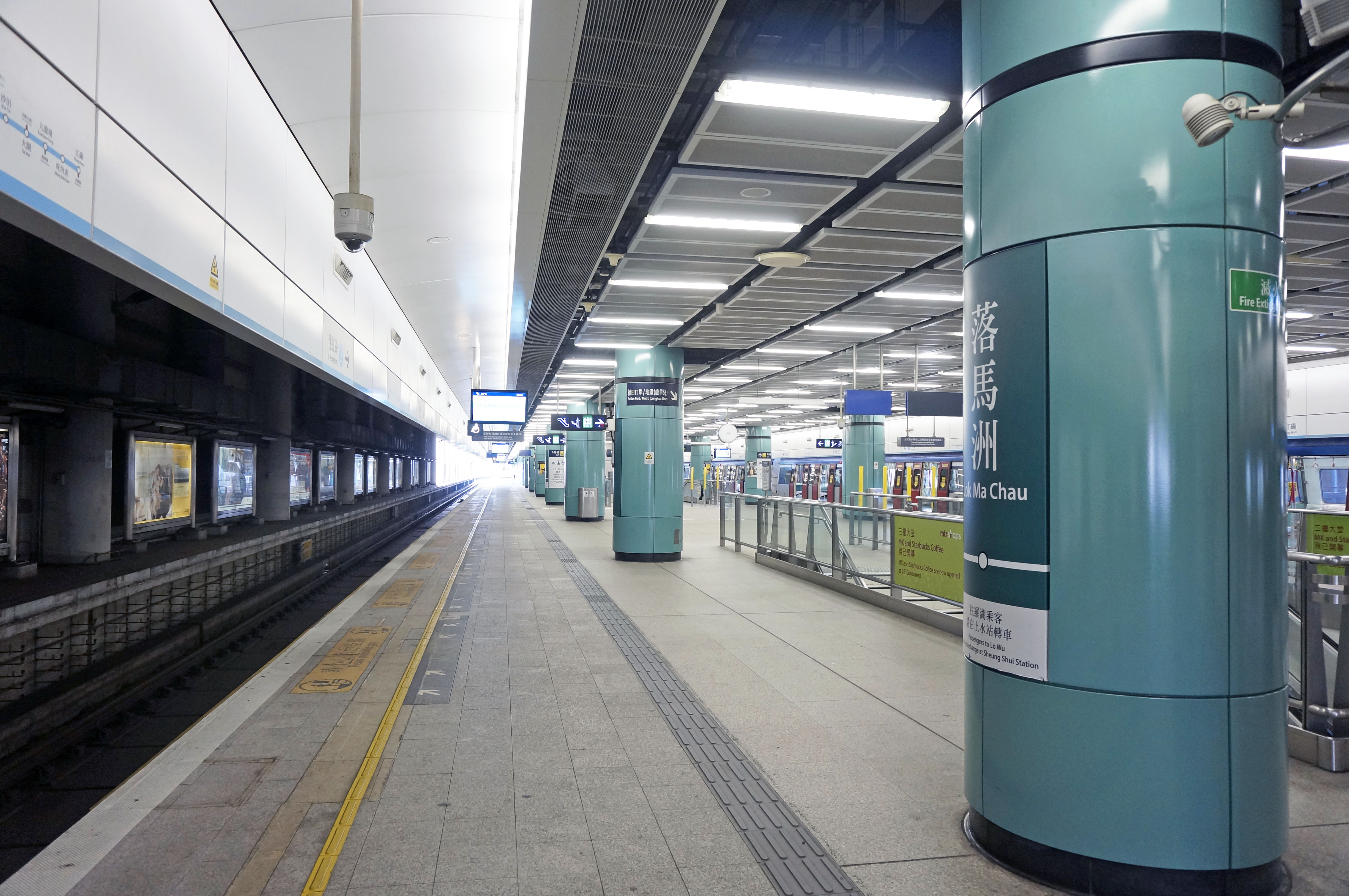 港鐵落馬洲站月台